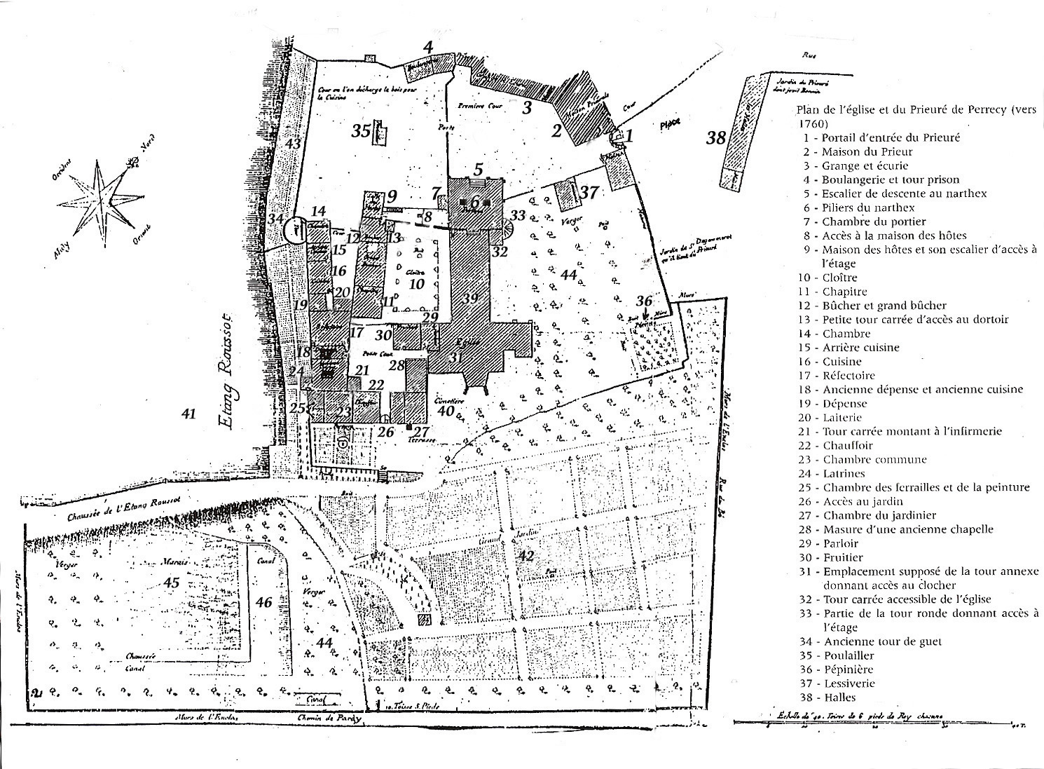 Perrecy-les-Forges, Lageplan von 1760